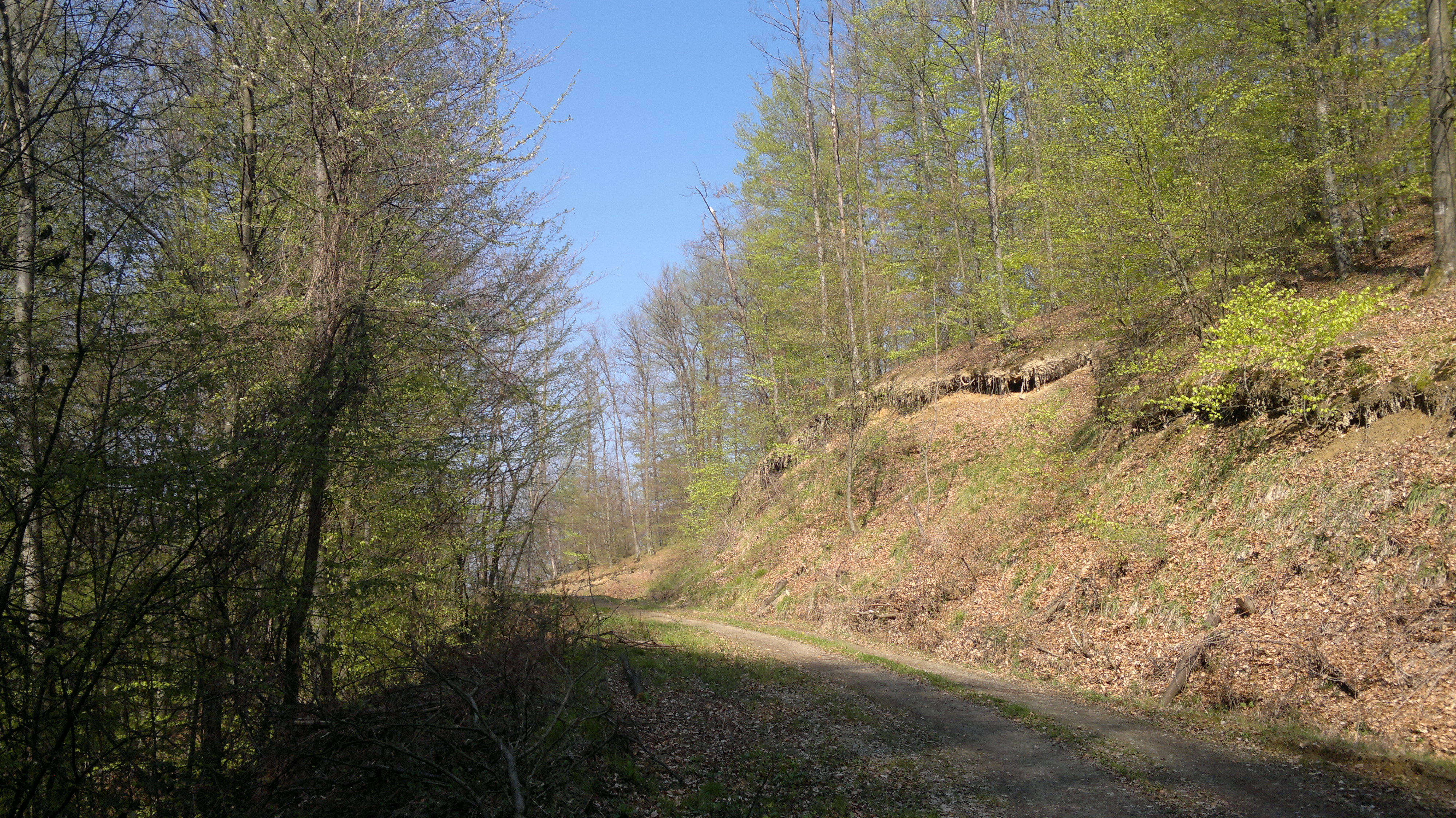 Kuzmica, Croatia